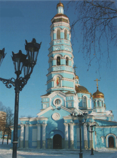 Собор Рождества Богородицы, город Уфа